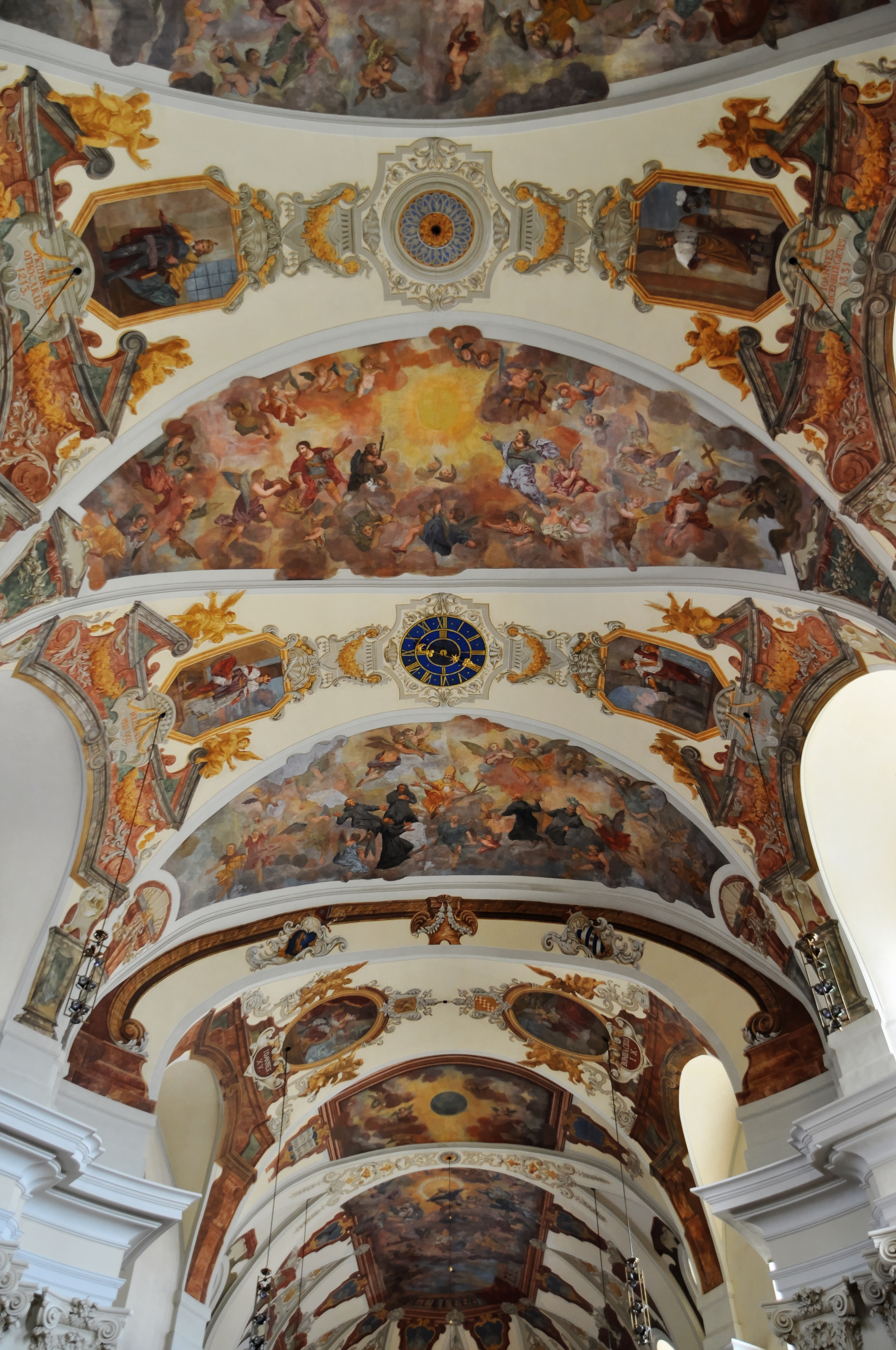 Břevnovský klášter, Markétská 1/28, Břevnov.